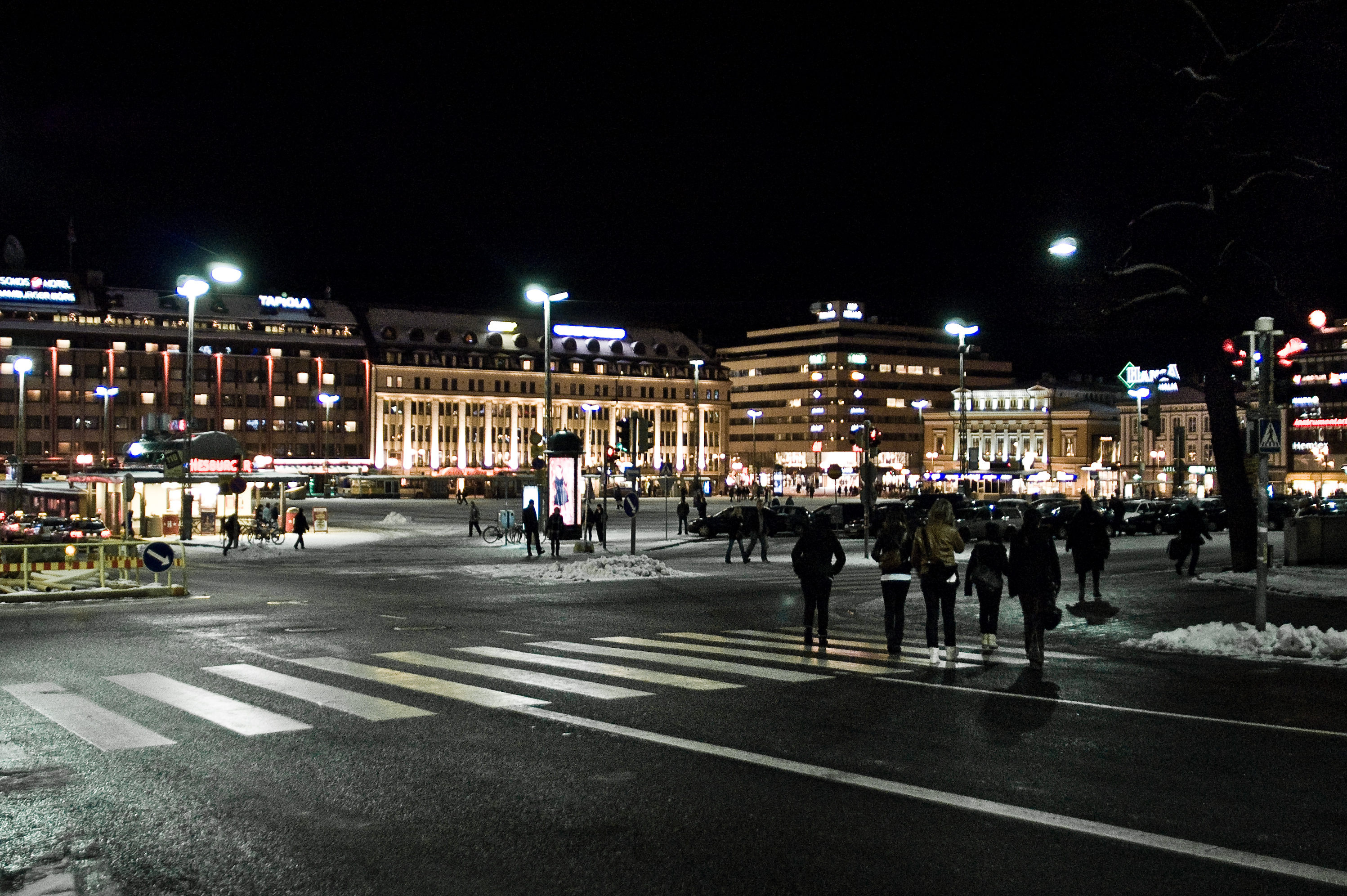 Turun Kauppatori Kauppiaskadulta.